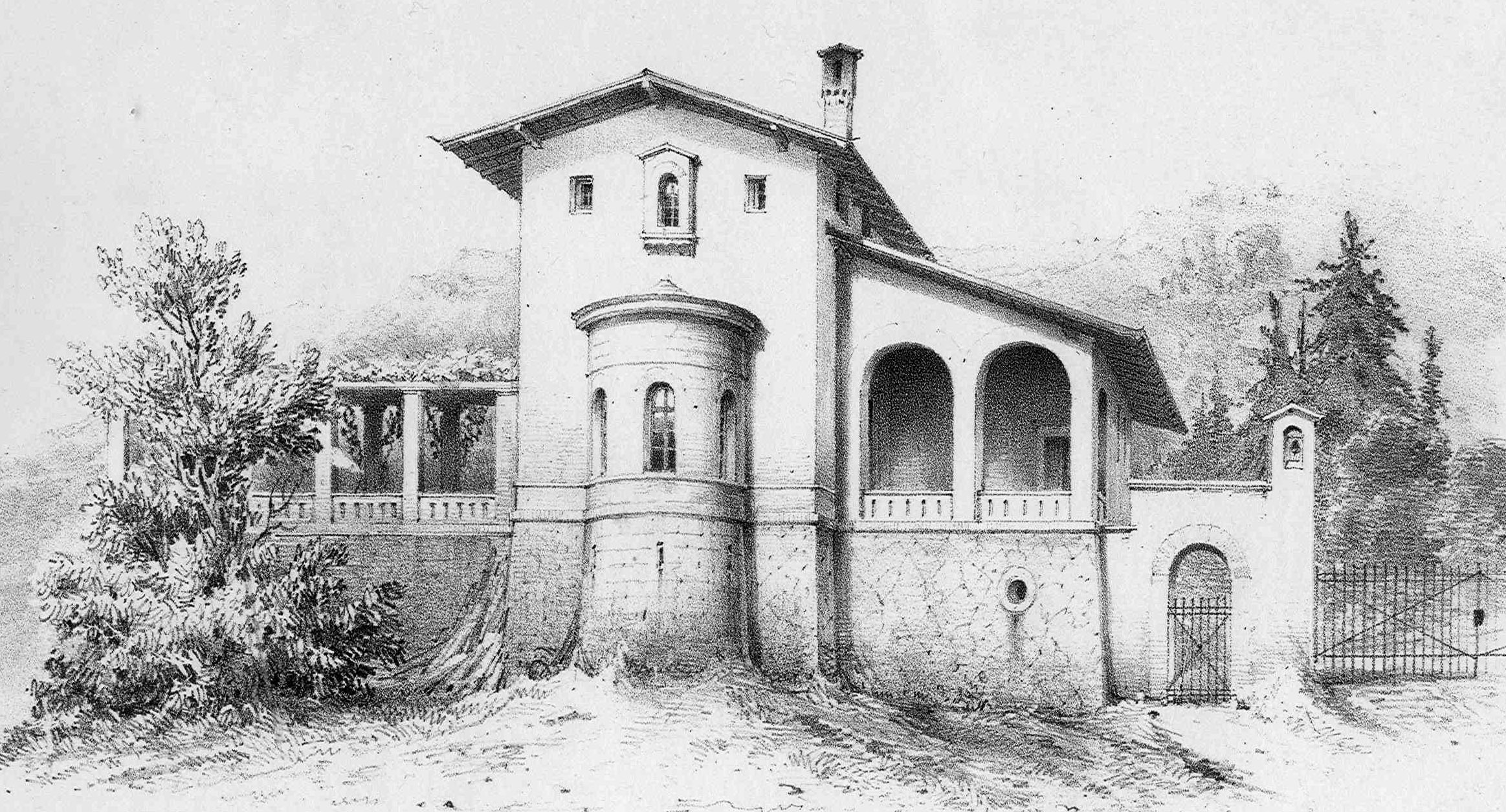 Pförtnerhaus Böttcherberg Klein-Glienicke, 1845